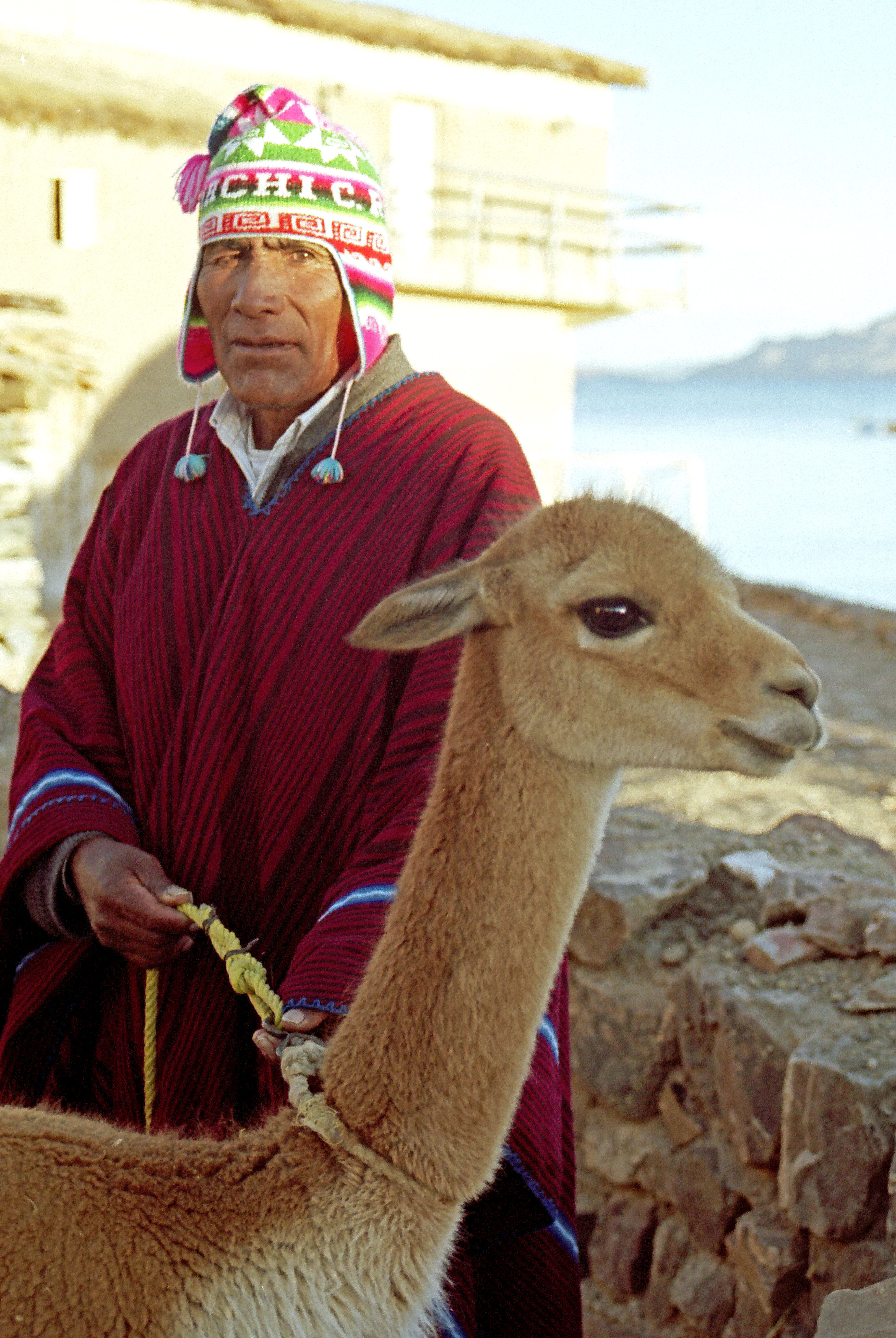 Bolivia-133